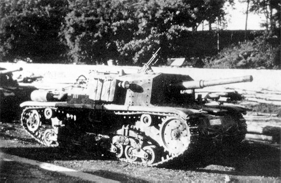 Il Semovente 75/34 su scafo M 41 fu l'aggiornamento più importante del 75/18 ottenuto principalmente con l'adozione, sullo scafo dell'M 41, di un cannone molto più potente e preciso, il nuovo 75/34, a cui si aggiungeva una corazzatura decisamente migliorata, che giungeva a ben 70 mm di spessore